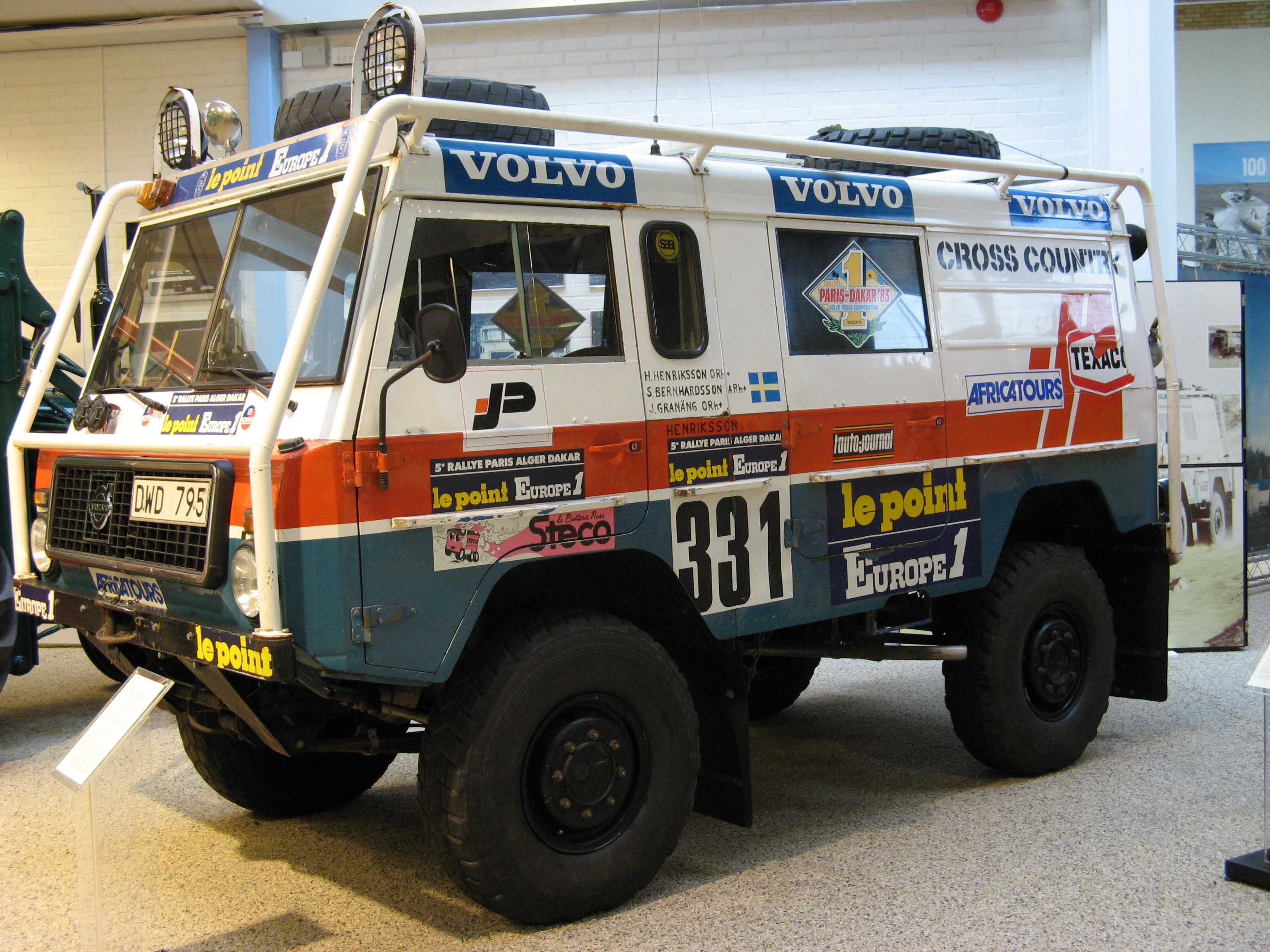 Volvo C303 Laplander